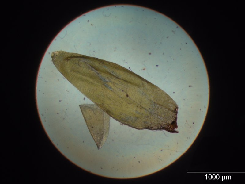 Rotstängelmoos (Pleurozium schreberi), Blatt, 40x vergrößert